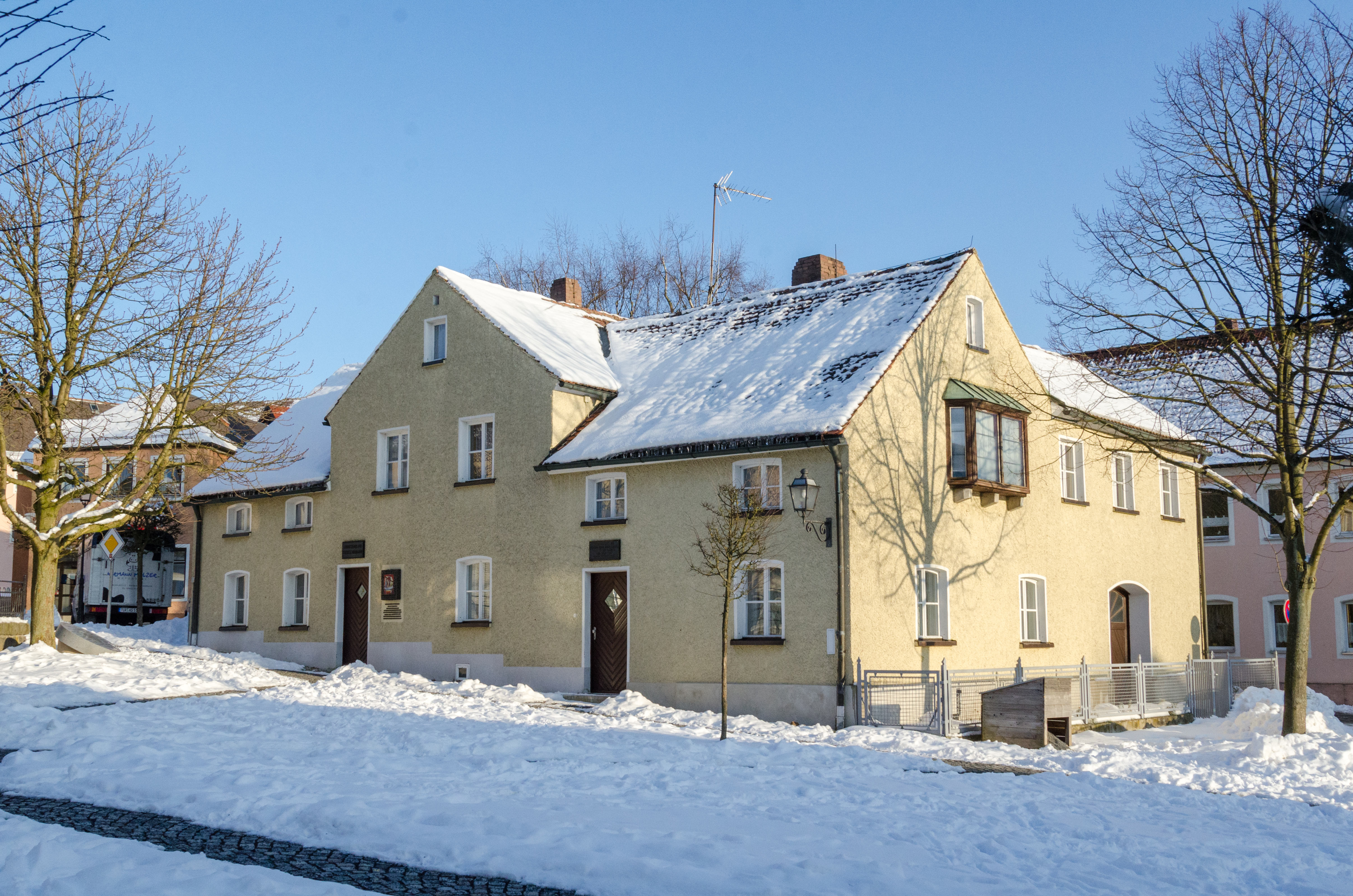 Konnersreuth, Wohn- und Elternhaus der stigmatisierten Therese Neumann